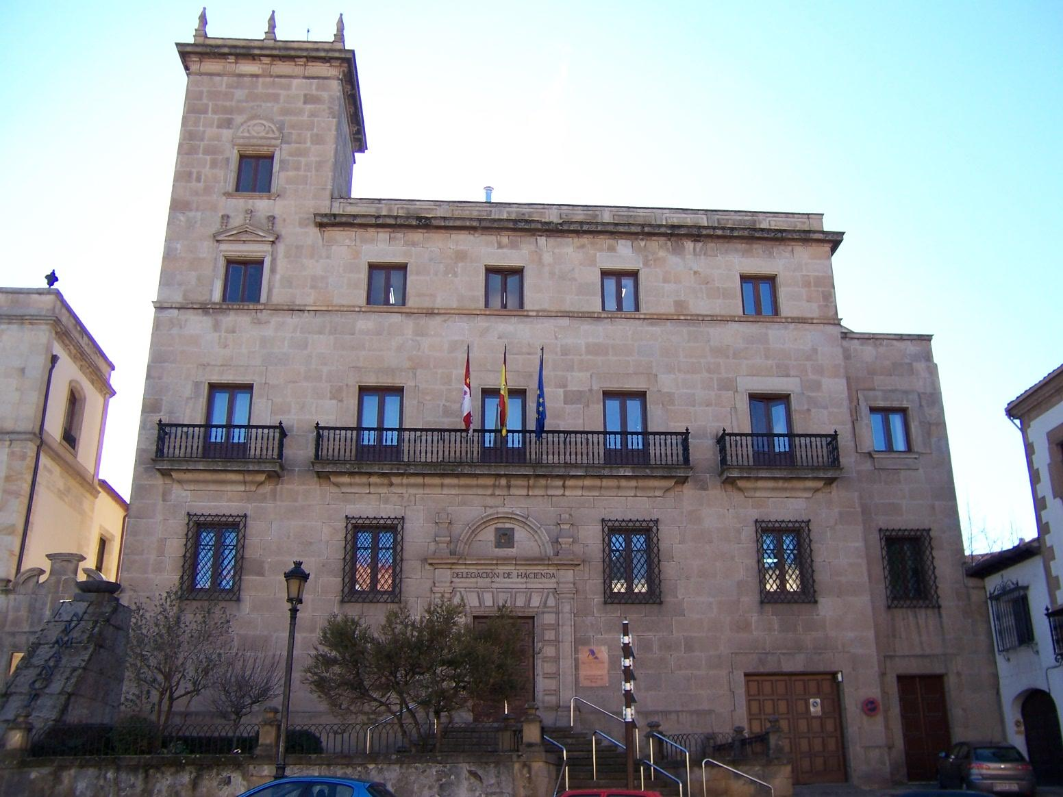 Delegación de hacienda de Soria / taxation office of Soria (Spain)